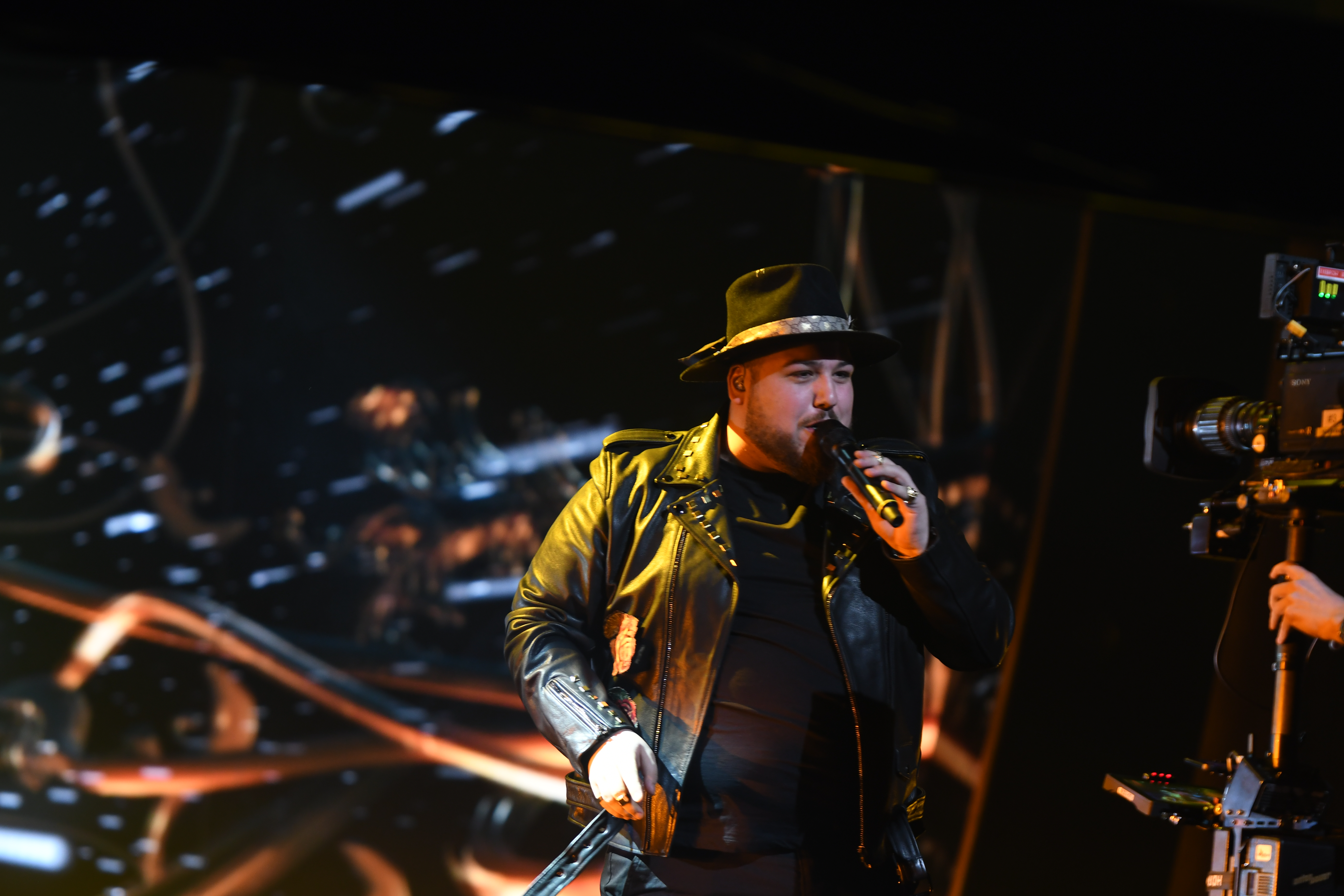 Melodifestivalen 2019, deltävling 1, Scandinavium, Göteborg, Zeana feat. Anis Don Demina